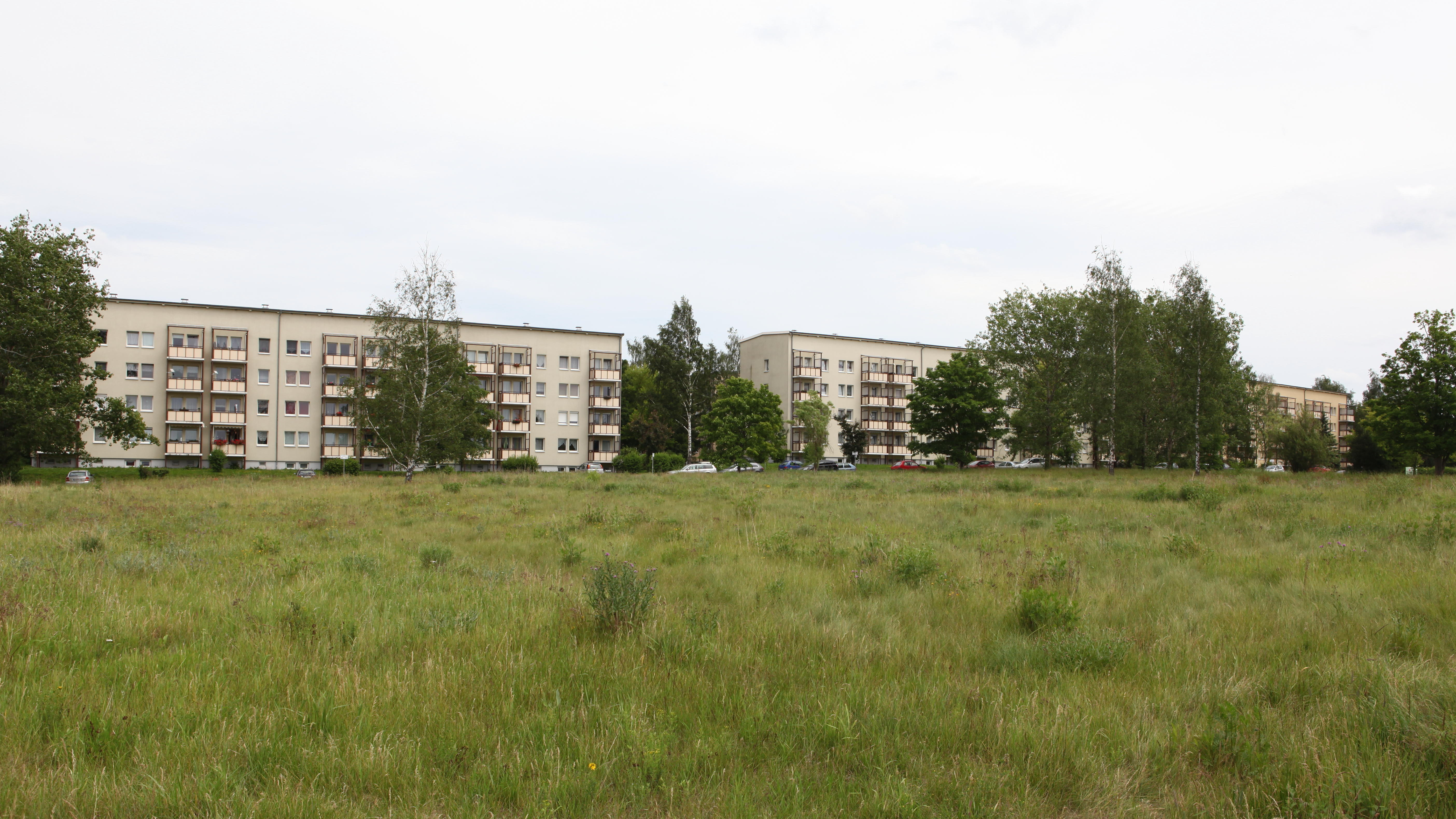 Wohngebiet Wolkenrasen in Sonneberg, Thüringen